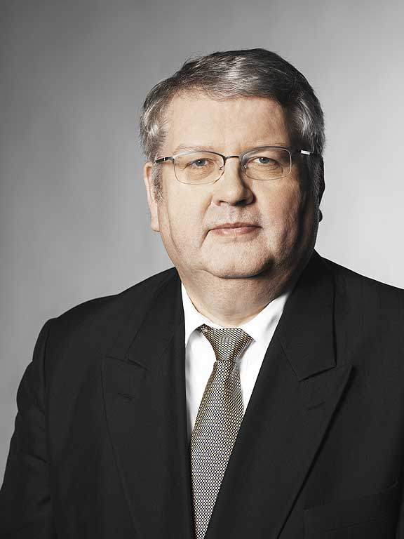 Anfinn Kallsberg, ehemaliger Ministerpräsident der Färöer, Vorsitzender der Fólkaflokkurin und Mitglied des Folketings. Føroyskt: Anfinn Kallsberg